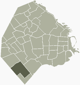 Barrio de Villa Lugano